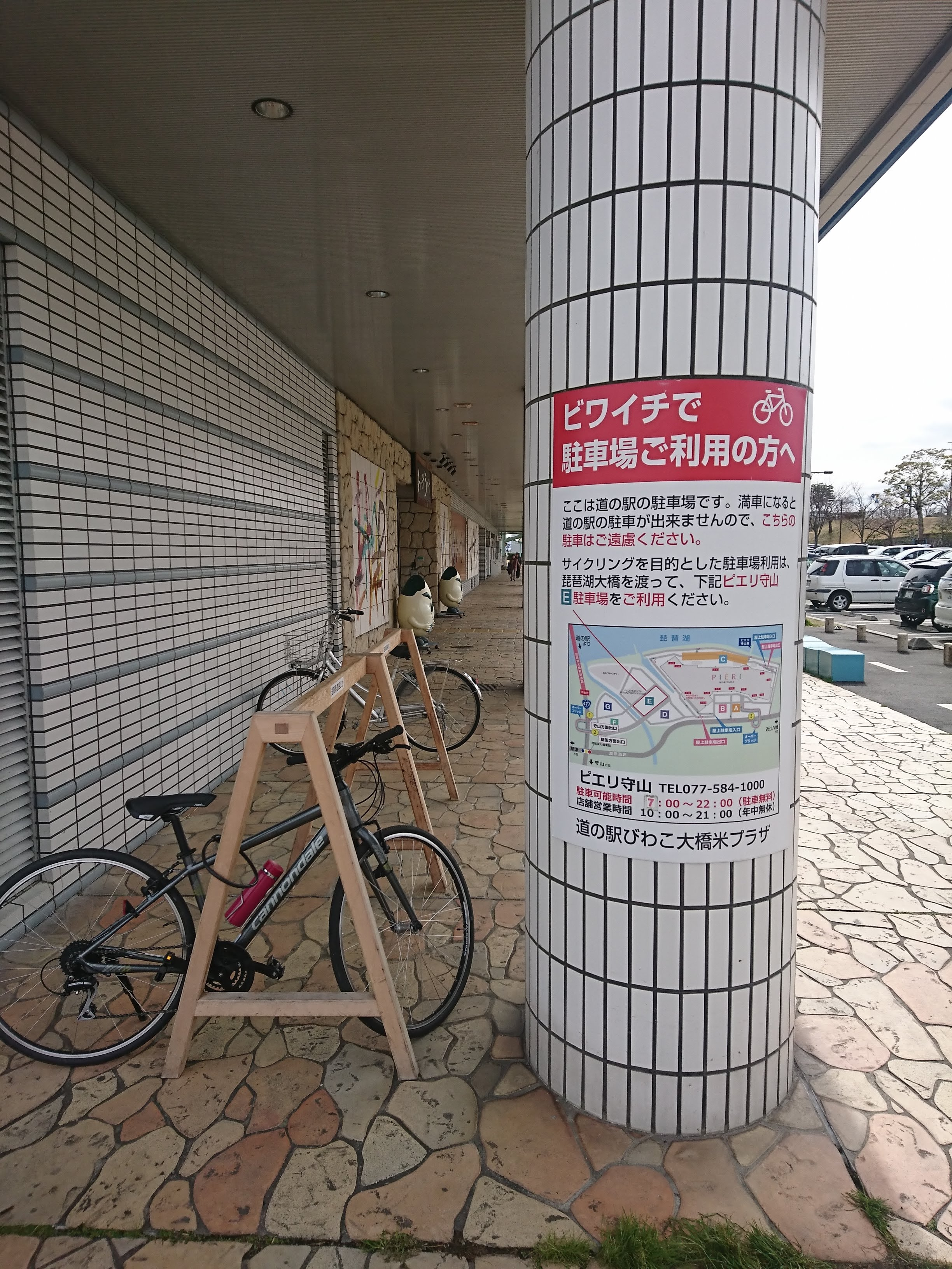 道の駅びわ湖大橋米プラザで、駐車場の容量が足りないため、ビワイチのために駐車する人にピエリ守山へ回るように促す施設管理者による掲示。後ろにバイクラックがあり、この裏にはビワイチ案内地図が貼ってある。